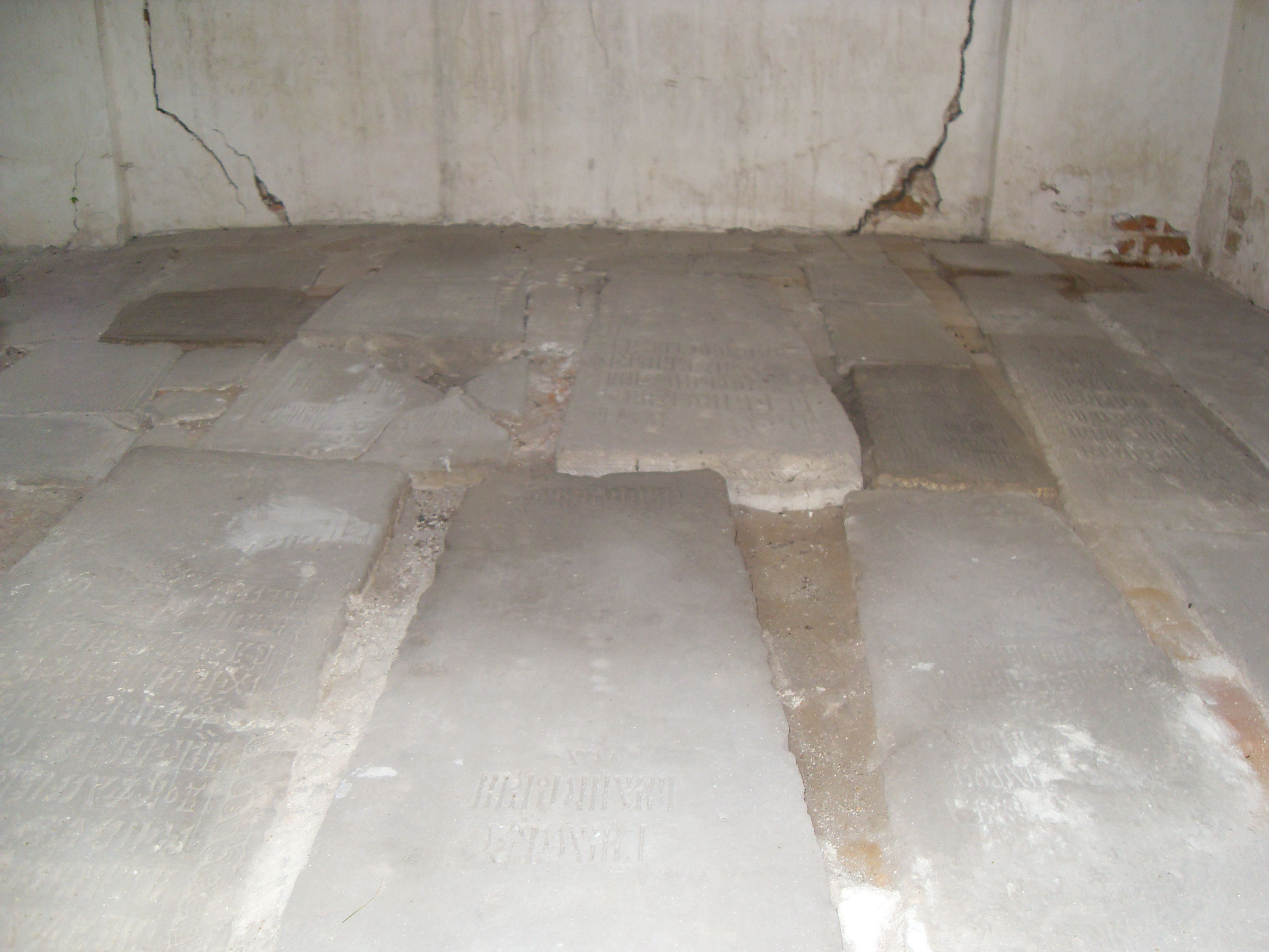 Усыпальница Строгановых изнутри. Сольвычегодский историко-художественный музей